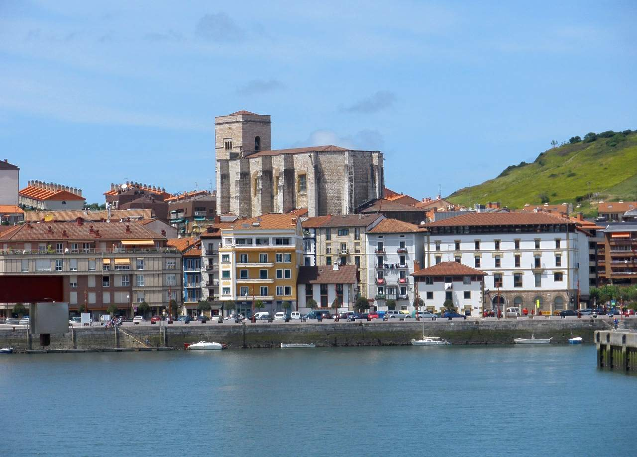 Vista de Zumaia, Gipuzkoa